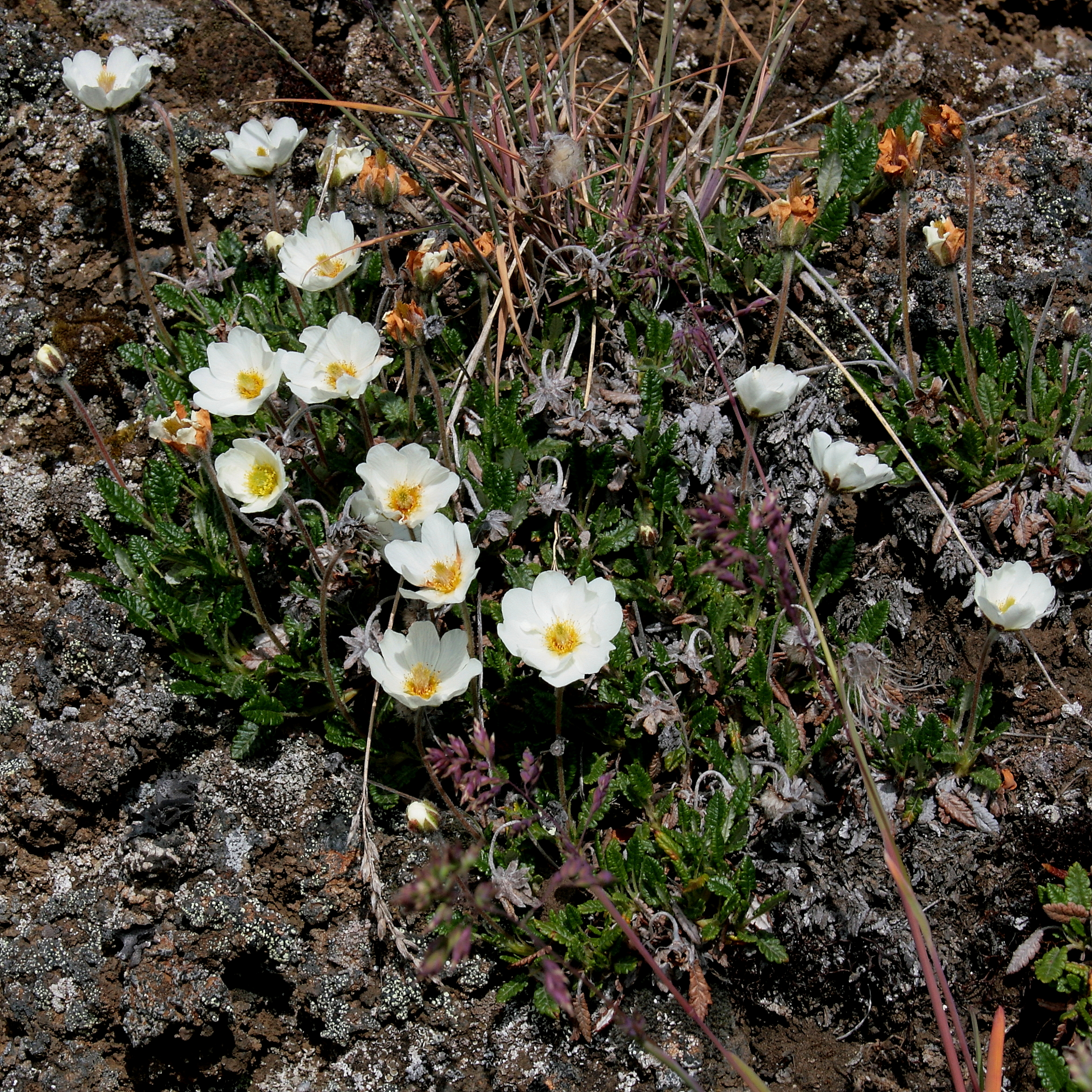 Auf_dem_Lavafeld_Dimmuborgir: Weiße Silberwurz (Dryas octopetala)